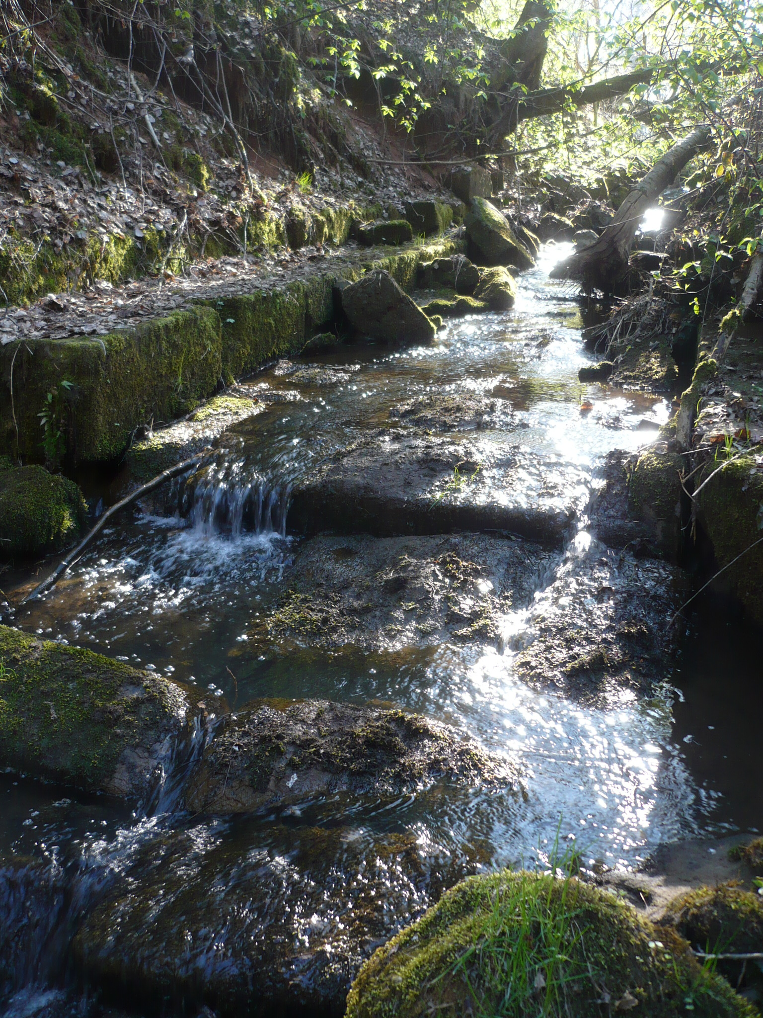 Tappertdurchbruch südlich Karolinenhöhe